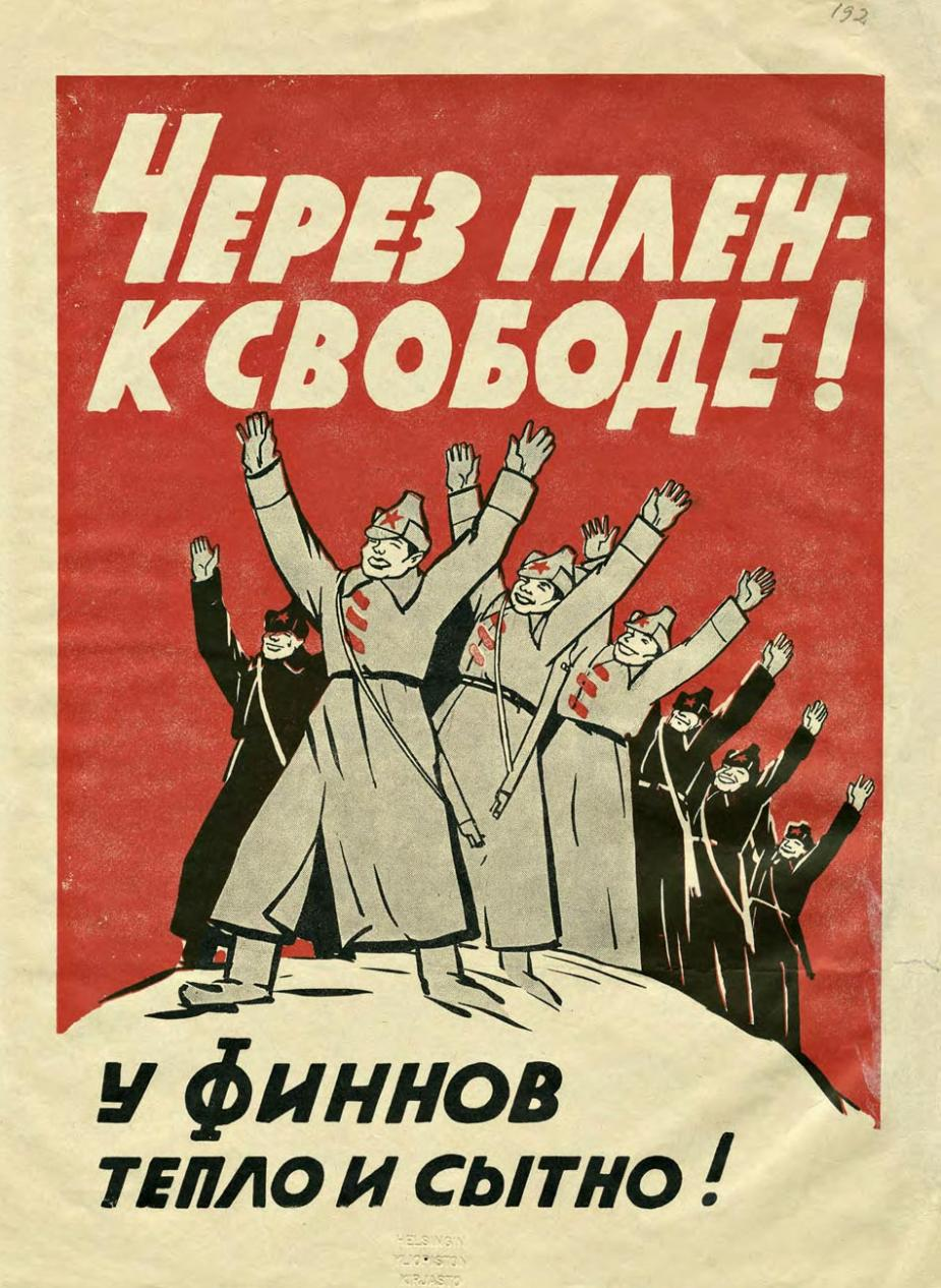 Листовка финской пропаганды